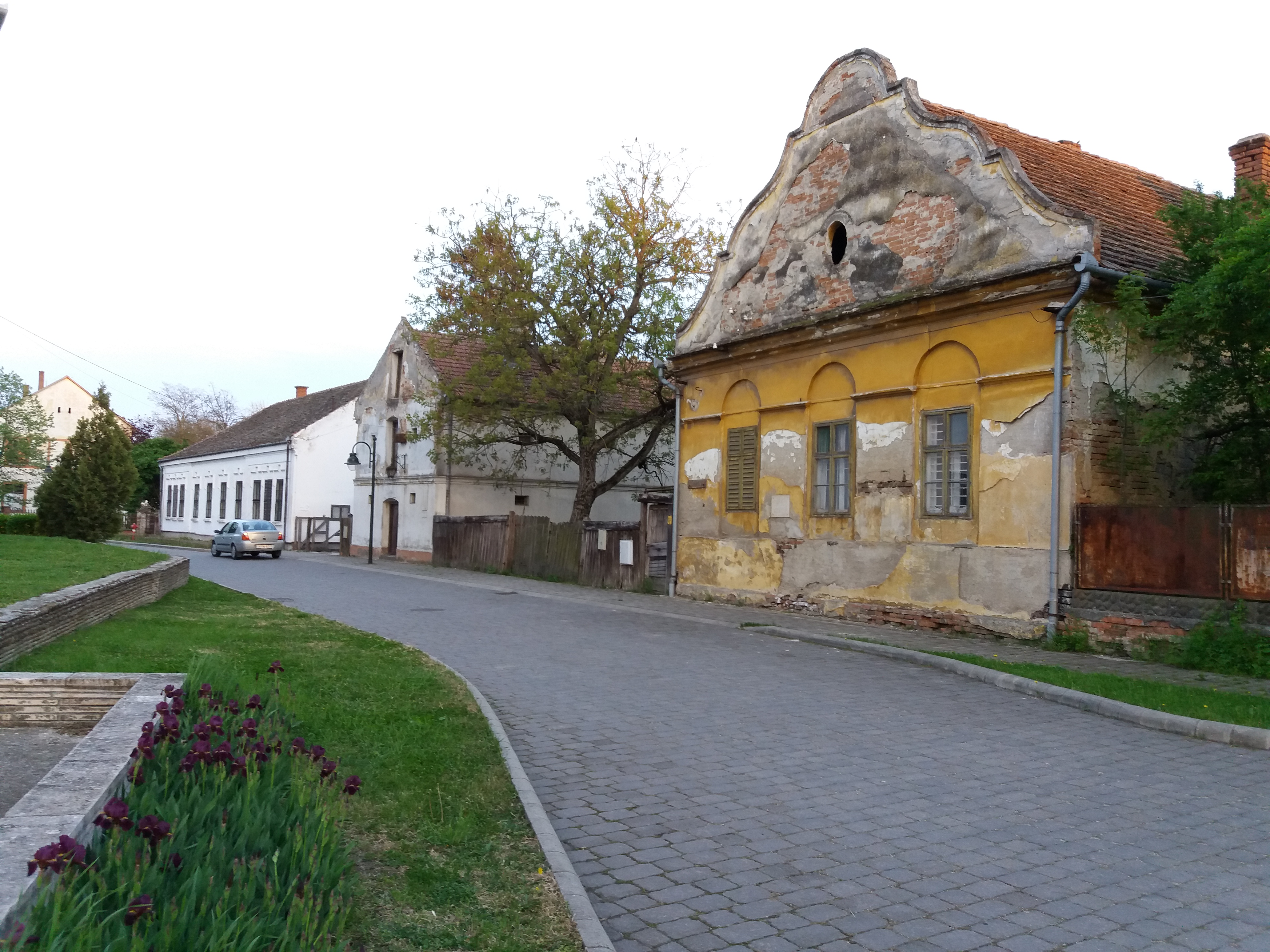 Reformétus lelkészlak és magtár.